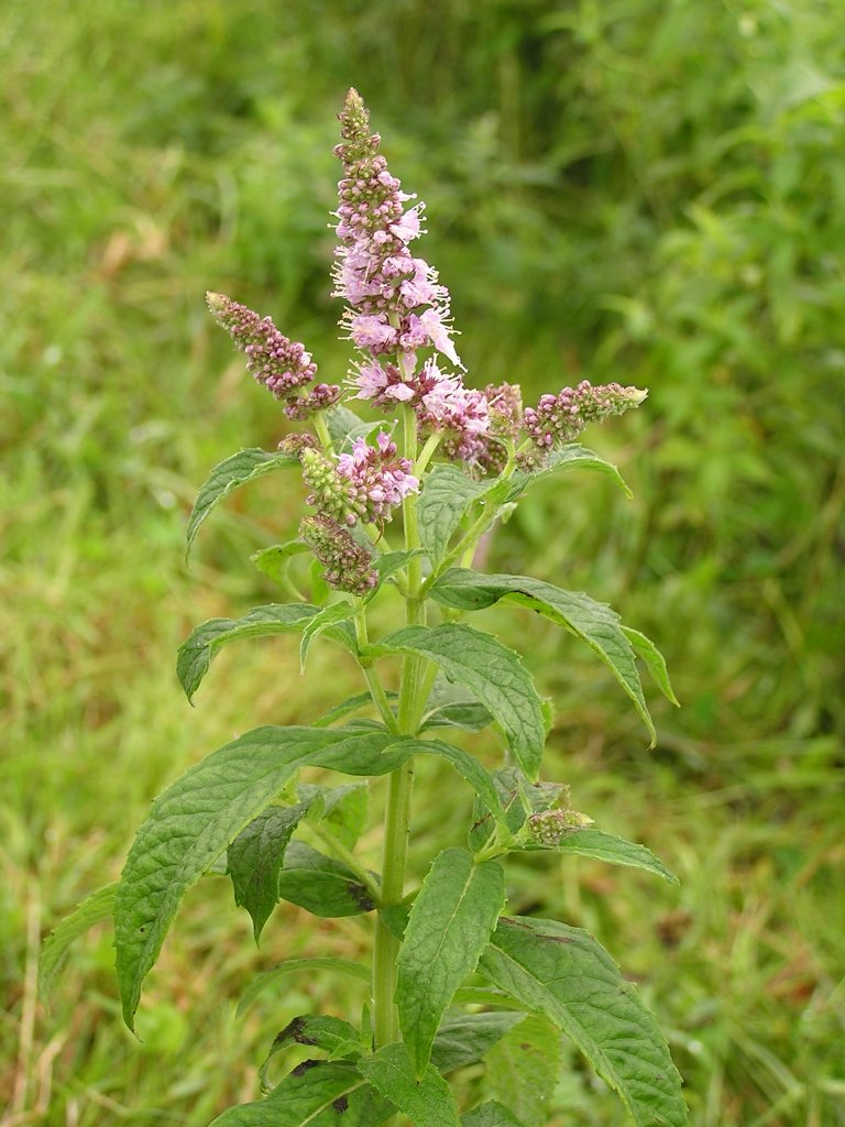 Mentha longifolia auf einer Alm im Bregenzer Wald.